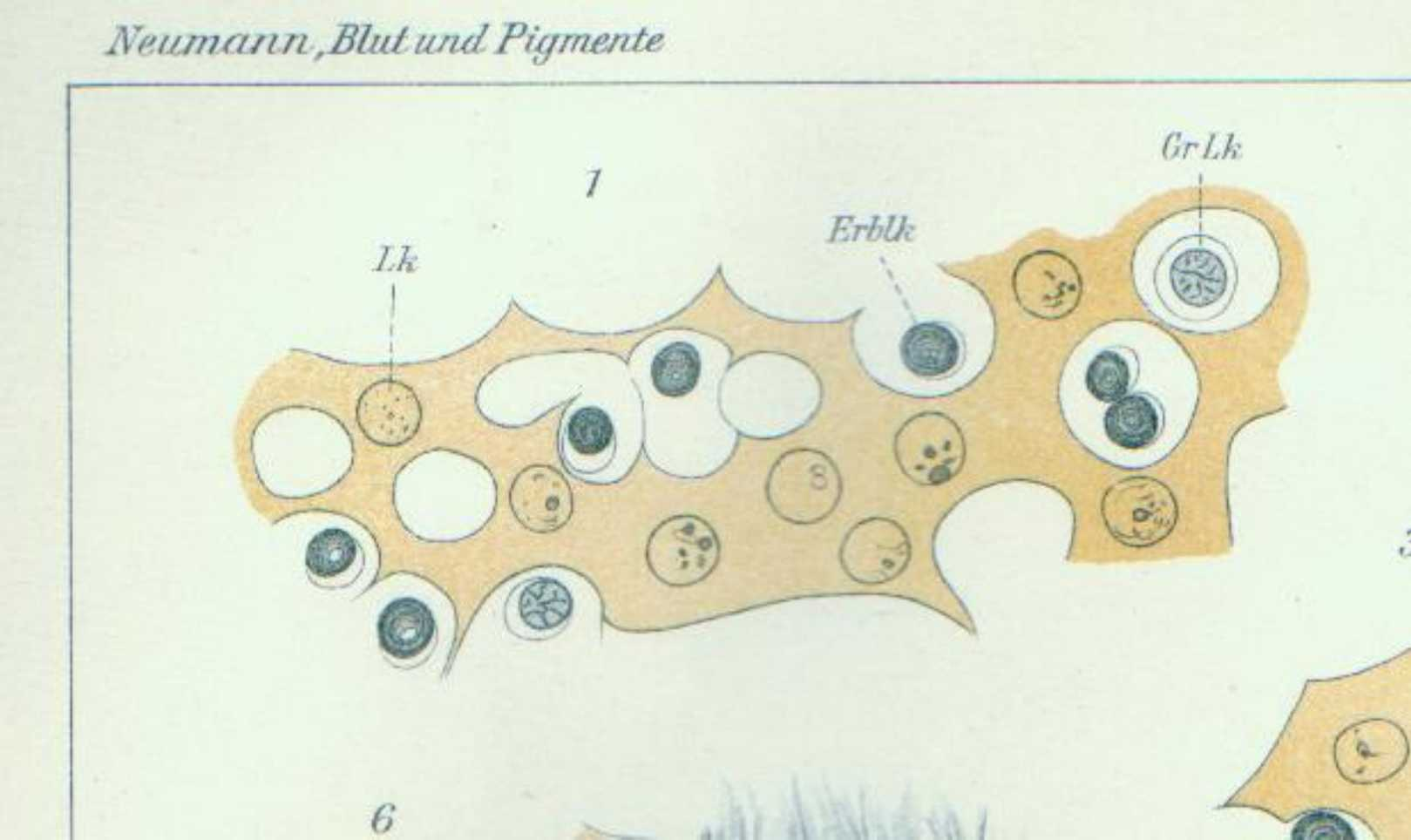 Universelle "Großlymphozytäre Stammzelle" (Grlk) für alle Blutzellreihen 1914 von Ernst Neumann (1834 - 1918), hier in der embryonalen Leber, Lit. Blut und Pigmente Jena 1917